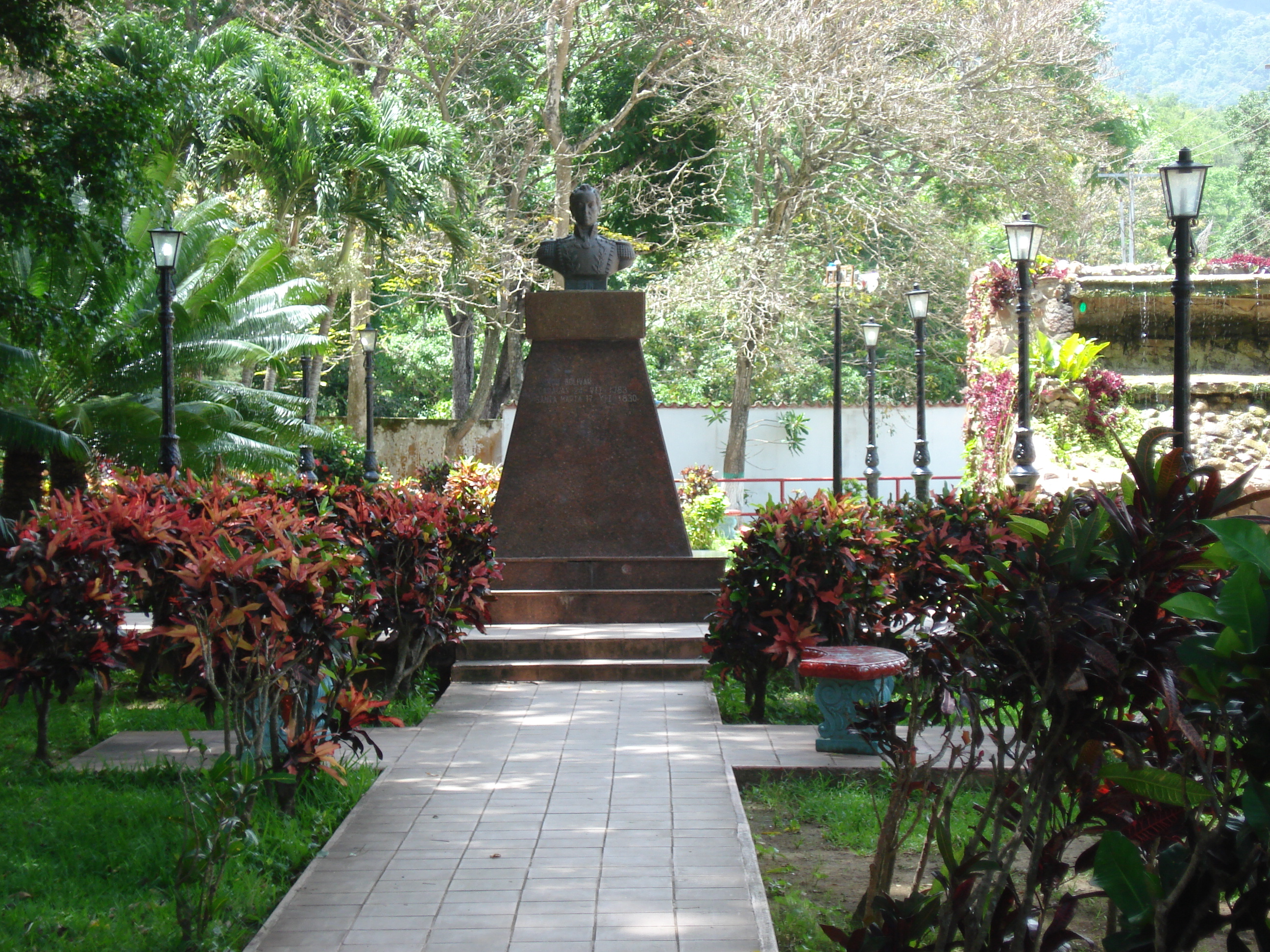 Plaza Bolívar de Cabure.